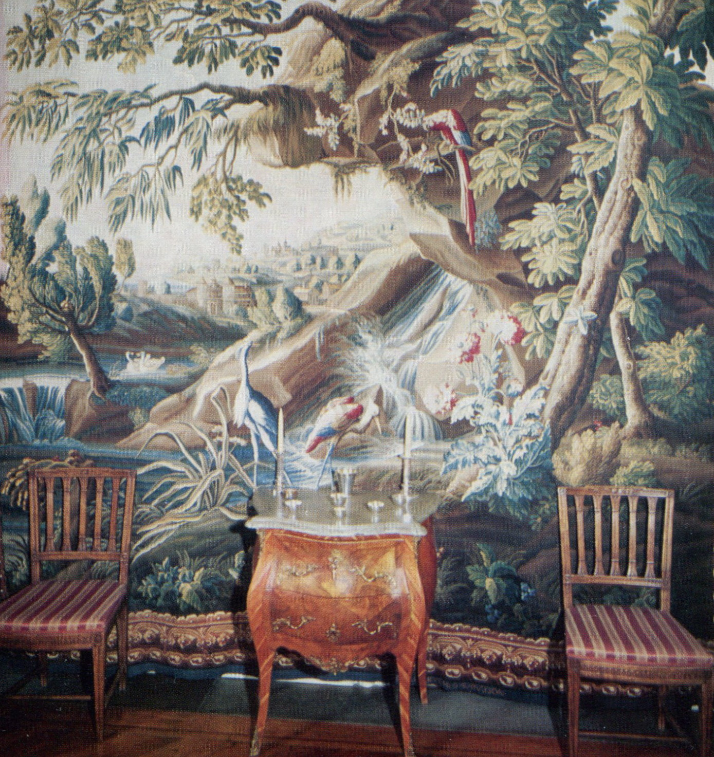 Hanebergs gård, skrivrummet